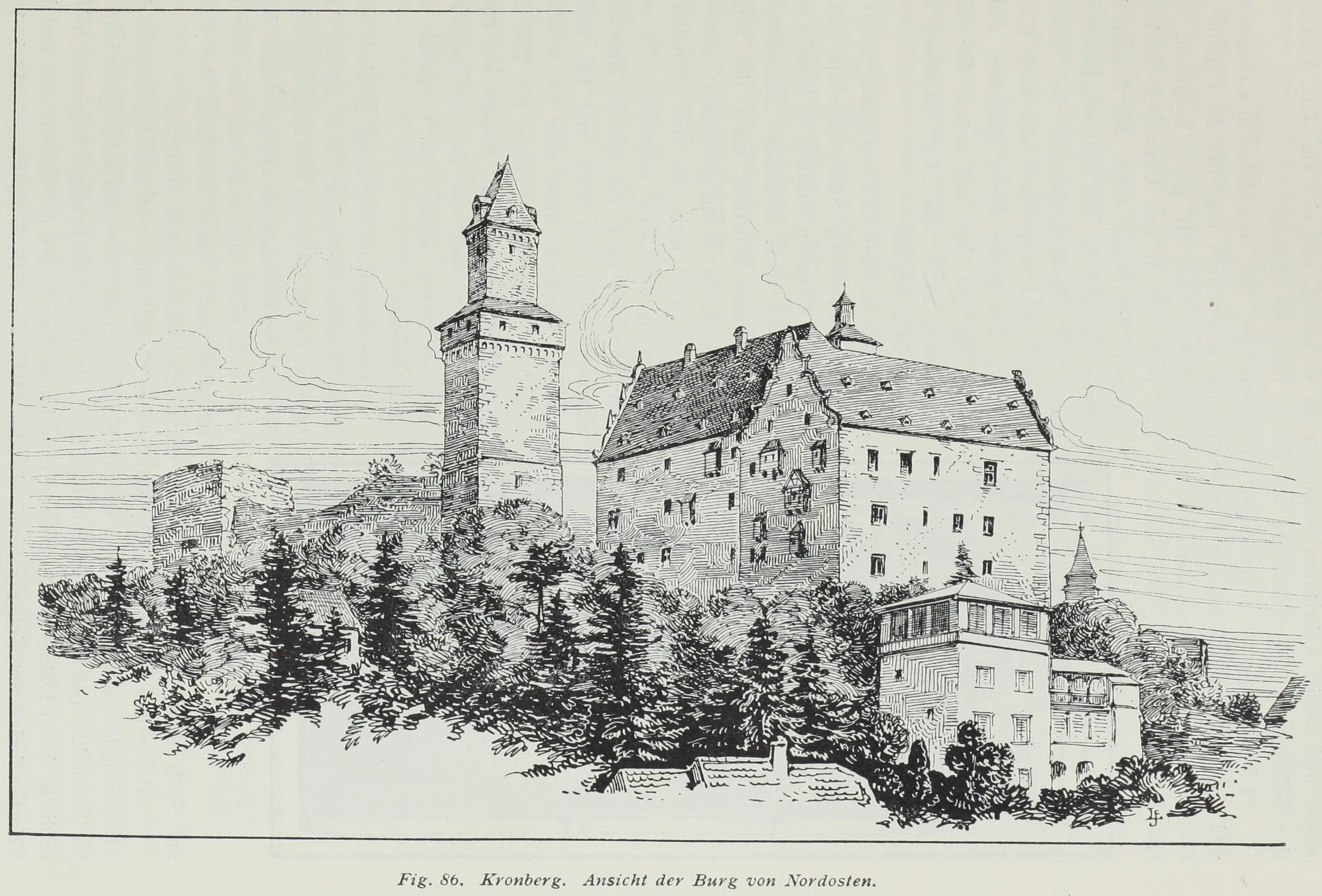 Kronberg Ansicht der Burg von Nordosten